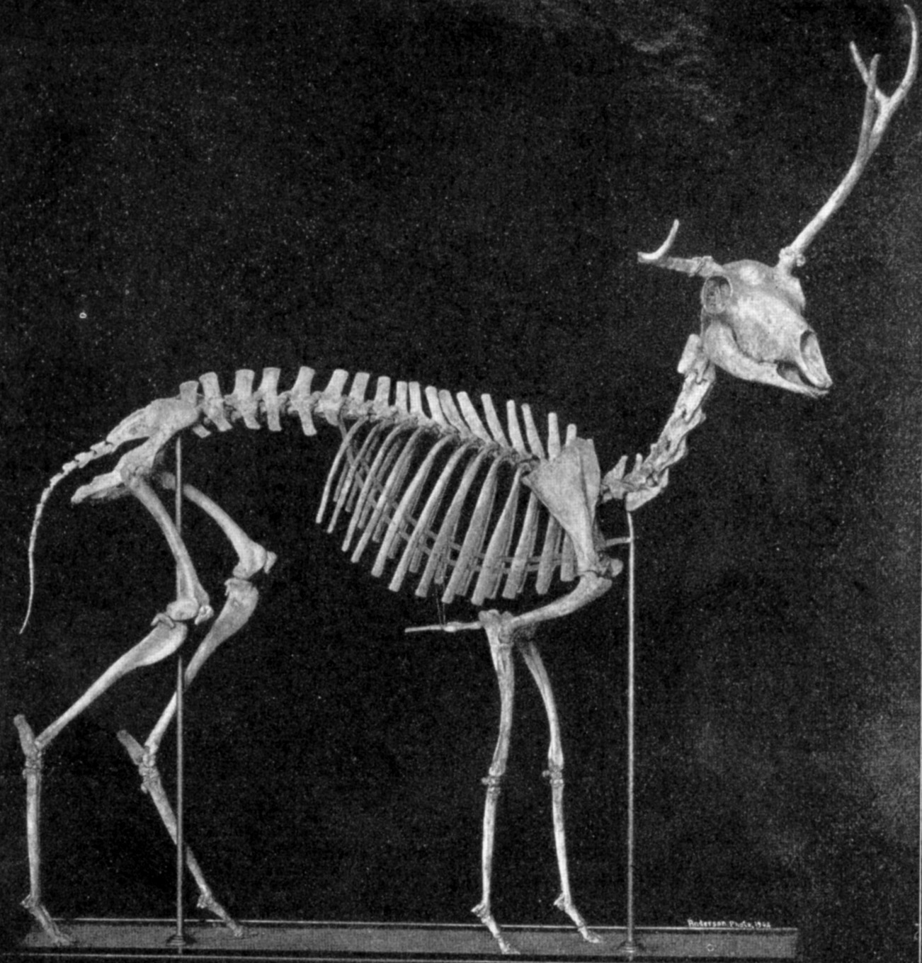 Ramoceros osborni skeleton.